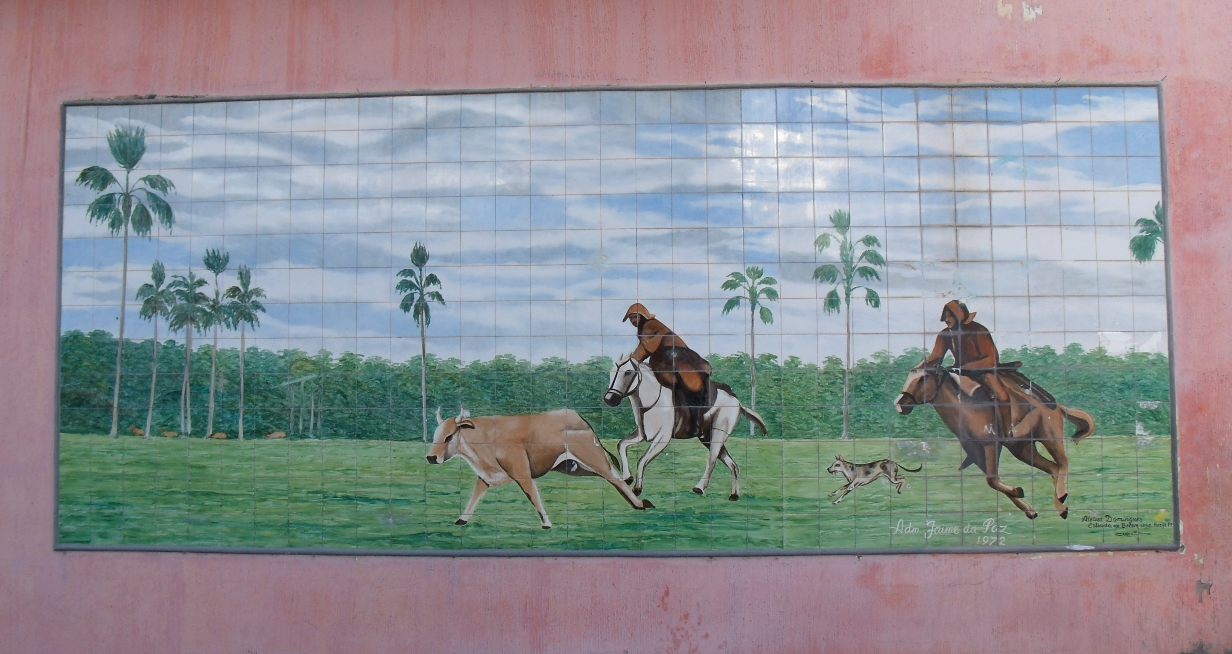 Imagem de vaqueiro sertanejo pintada em ladrilhos no Mercado Público de Campo Maior, Piauí.